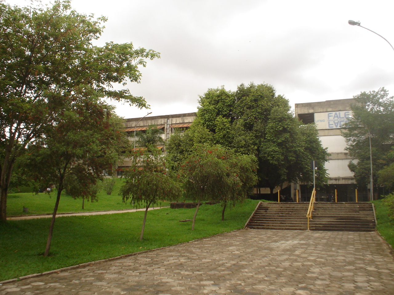 Prédio da Faculdade de Letras da UFMG.